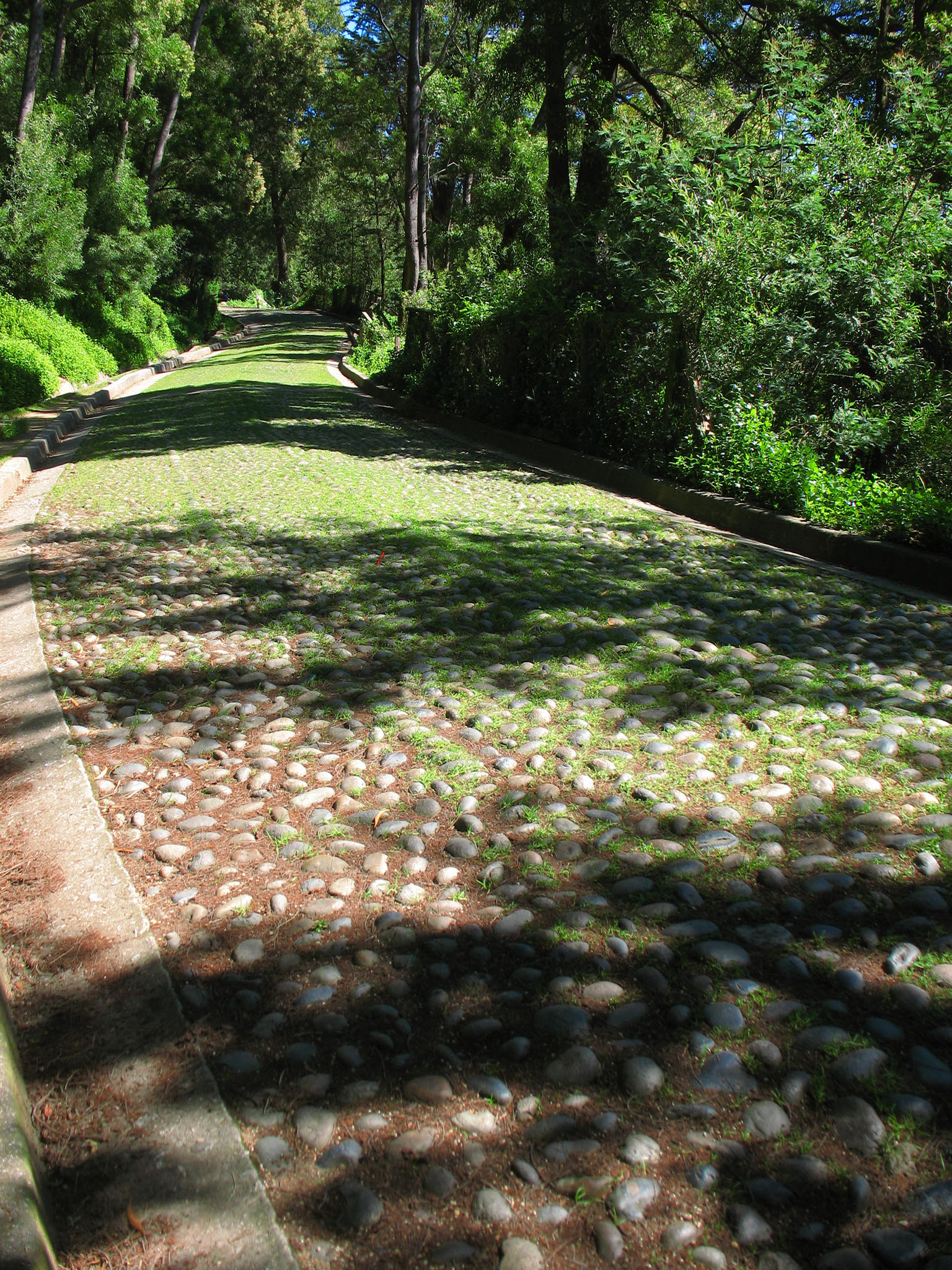 Concepcion, subida cerro Caracol